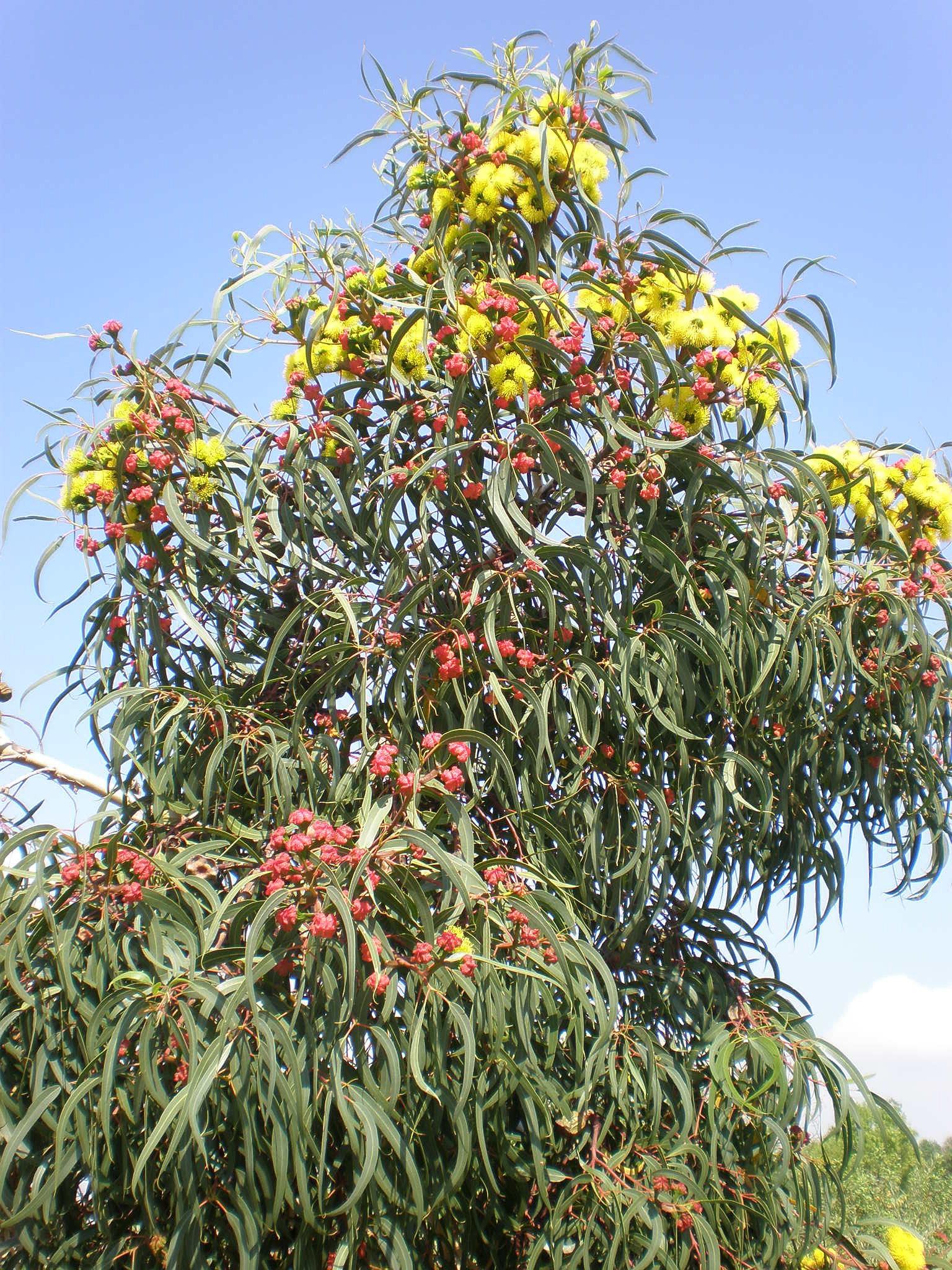 Jardín Botánico de Barcelona.